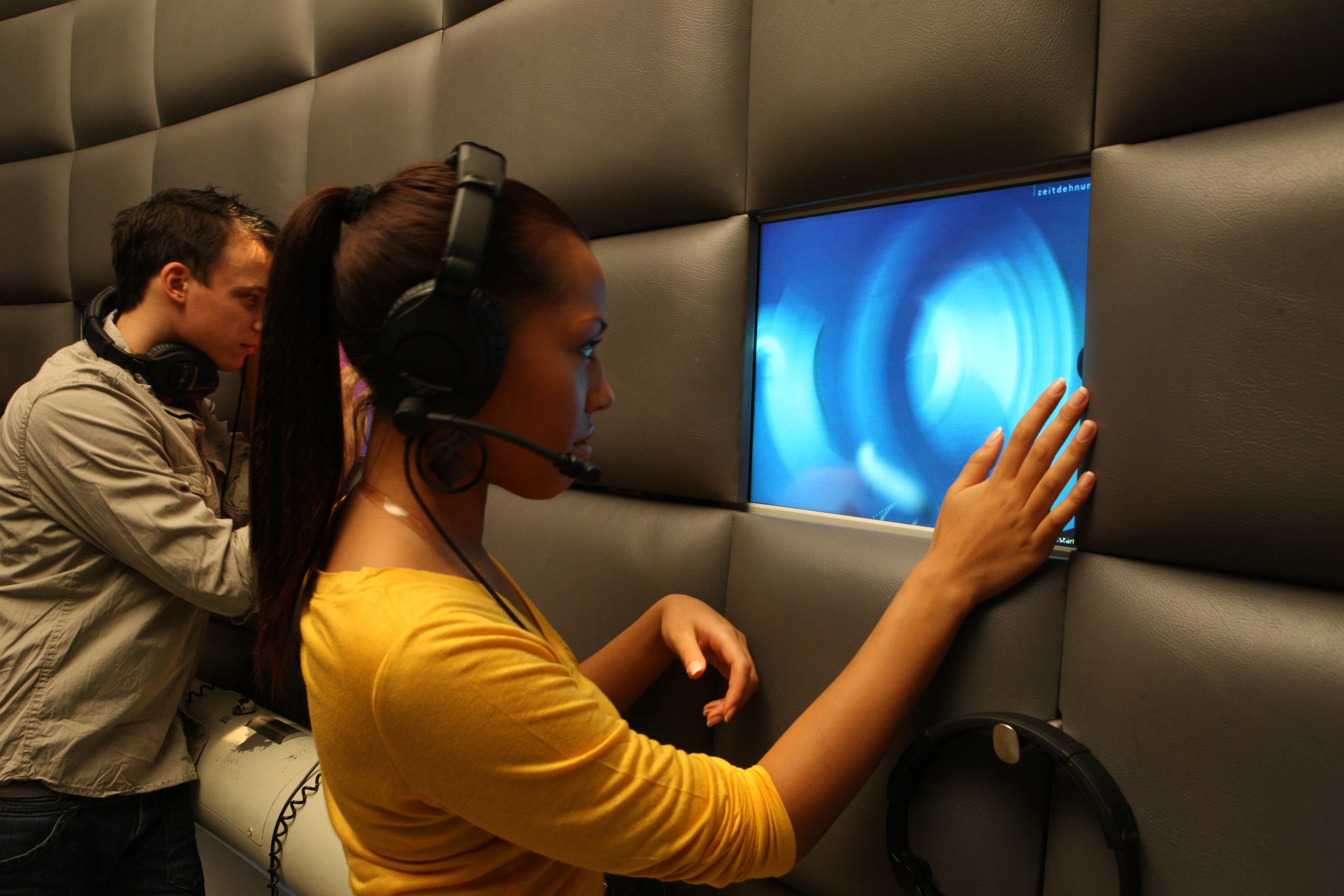 Die Sonosphere im zweiten Stock des Klangmuseums widmet sich klanglichen Phänomenen.